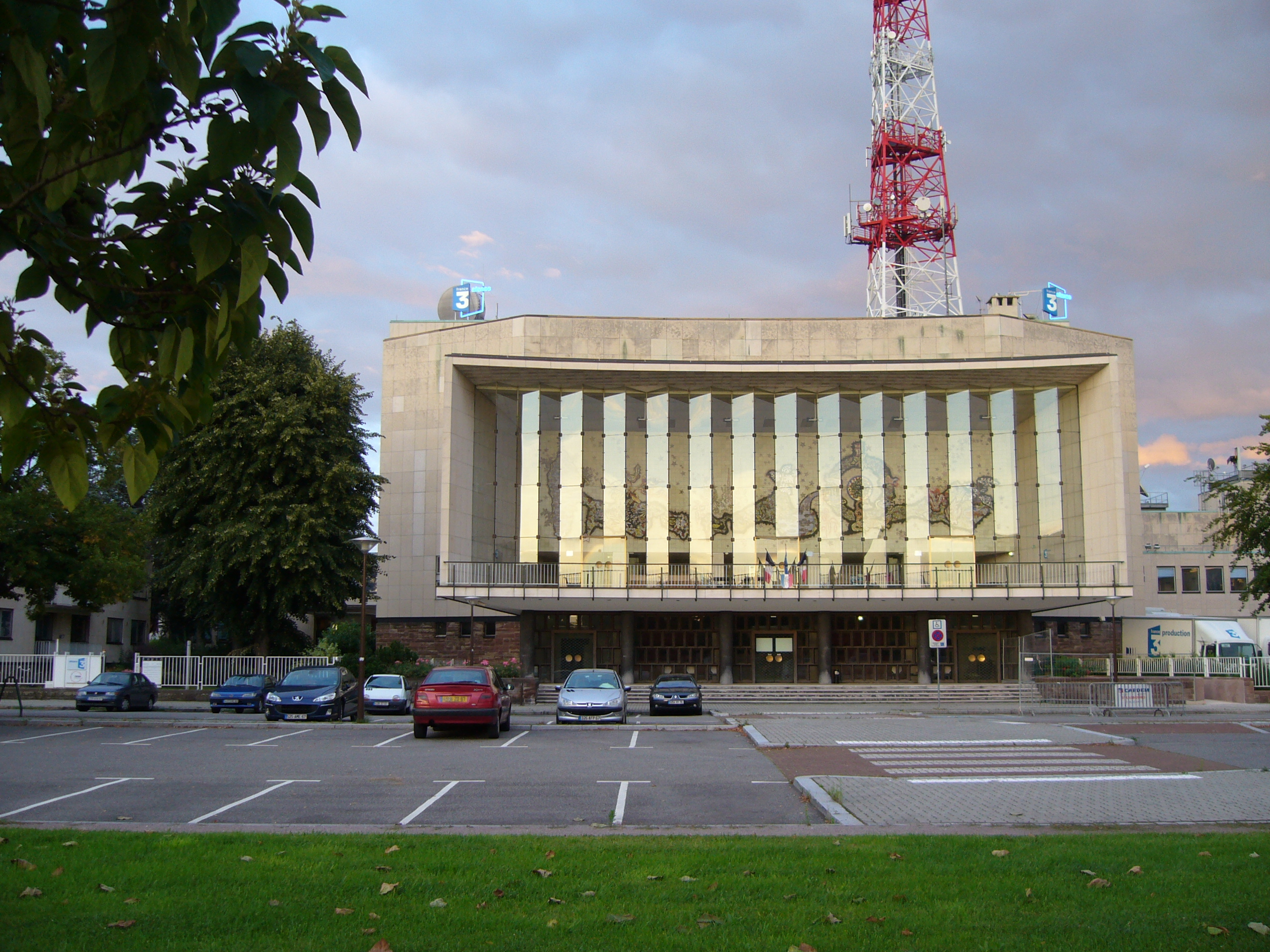 Siège de France 3 Alsace, avec céramique de Jean Lurçat, La Création du monde. Le pylône en arrière-plan a servi de 1953 à 1964 à diffuser provisoirement la TV jusqu'à son remplacement par celui de Nordheim, vers lequel il assure désormais uniquement les liaisons hertziennes.